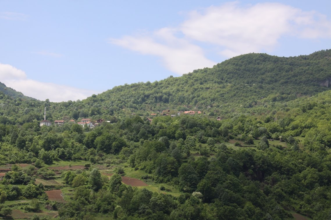 Gorani